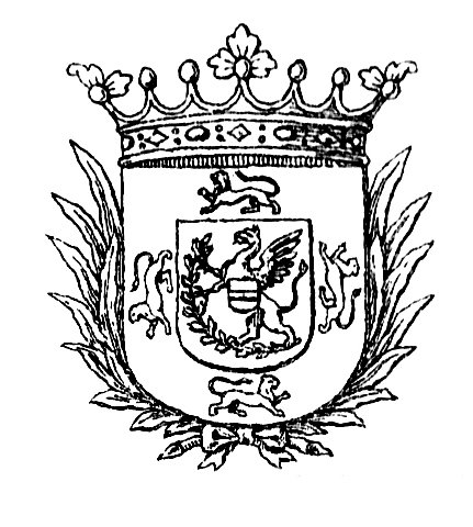 Våpenet til Markis av Mandal, tegnet av heraldikeren Anders Thiset.